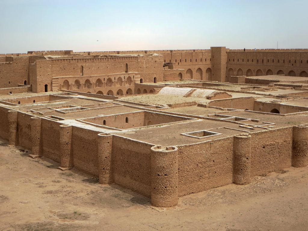 مبنى حصن الأخيضر الأثري في العراق The 8th century Al-Ukhaidir Fortress in the desert west of Karbala is one of the best preserved monuments from the Abbasid Caliphate in Iraq.